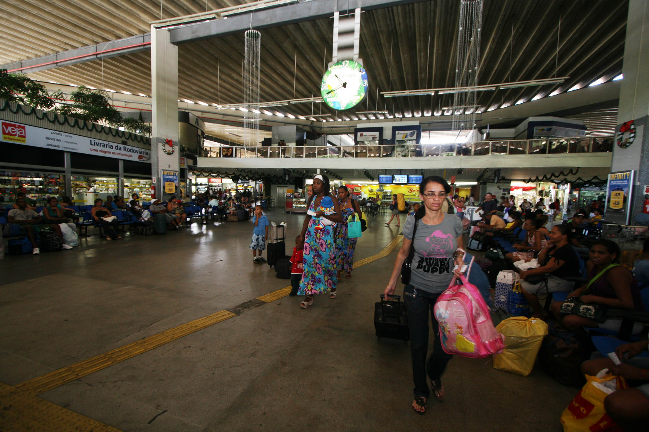 Movimentação de saída da cidade para o Ano Novo Na foto: Terminal Rodoviário de Salvador. Foto: Carol Garcia / SECOM